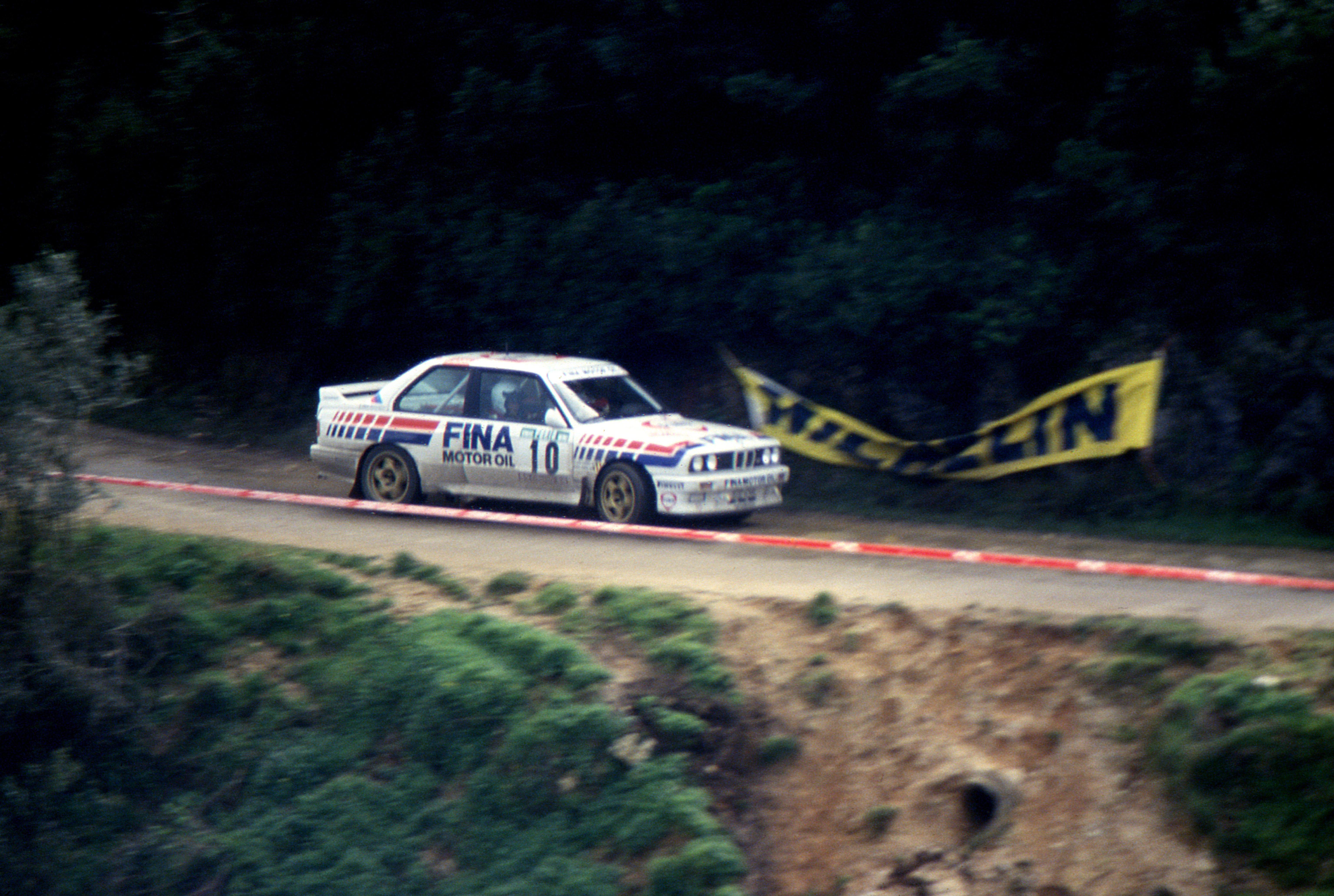 Slide - 05-89 Kodak Rally_Portugal_1989_Montejunto - 008